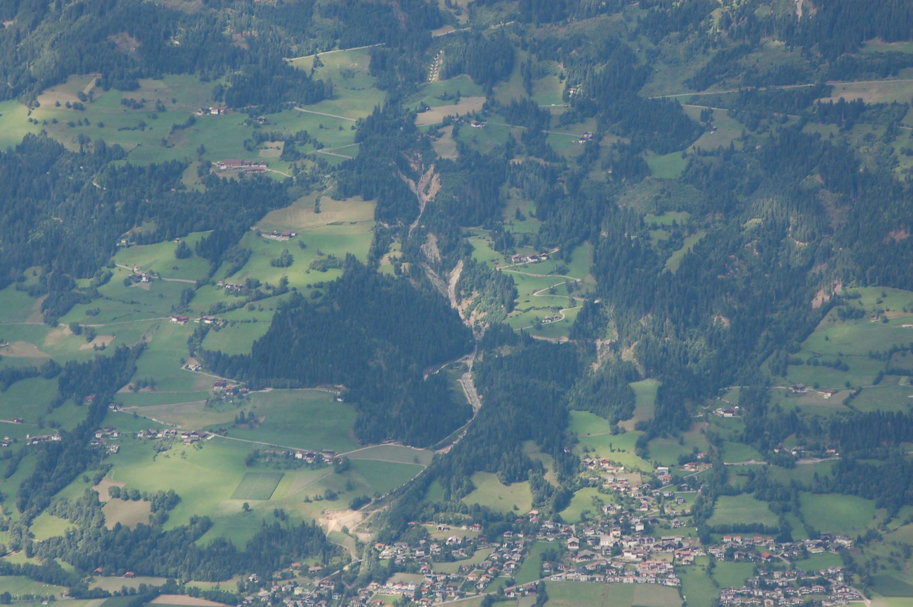 Der Wartschenbach, fotografiert von der Laserzwand